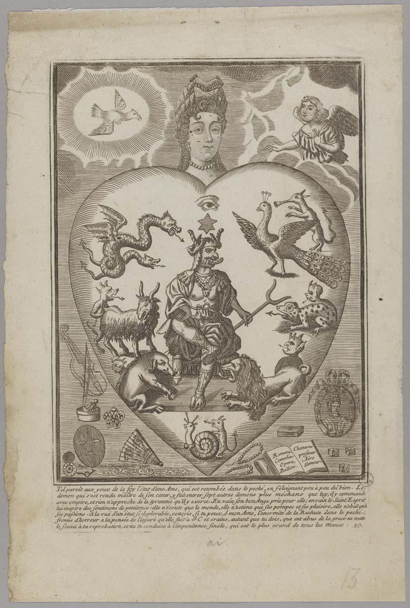 titre factice)